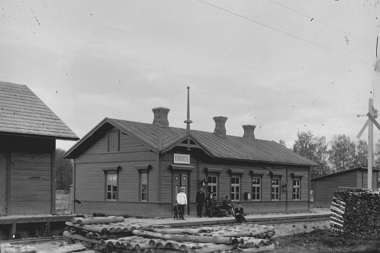 Koikküla jaam 20. sajandi alguses